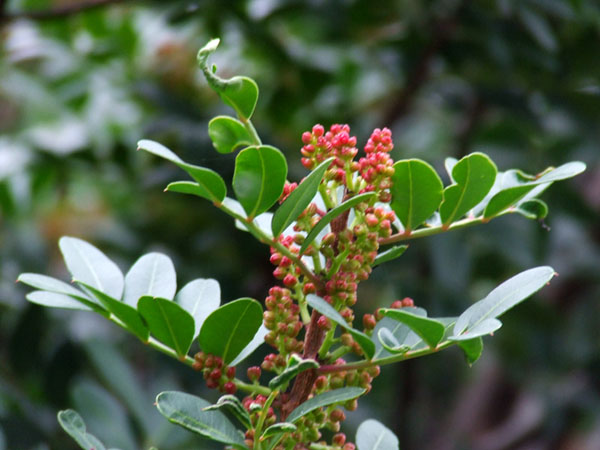 Bacche di Terebinto (Pistacia terebinthus). Il terebinto ha foglioline in numero dispari e rachide non alato; il lentisco ha foglioline pari e rachide alato.